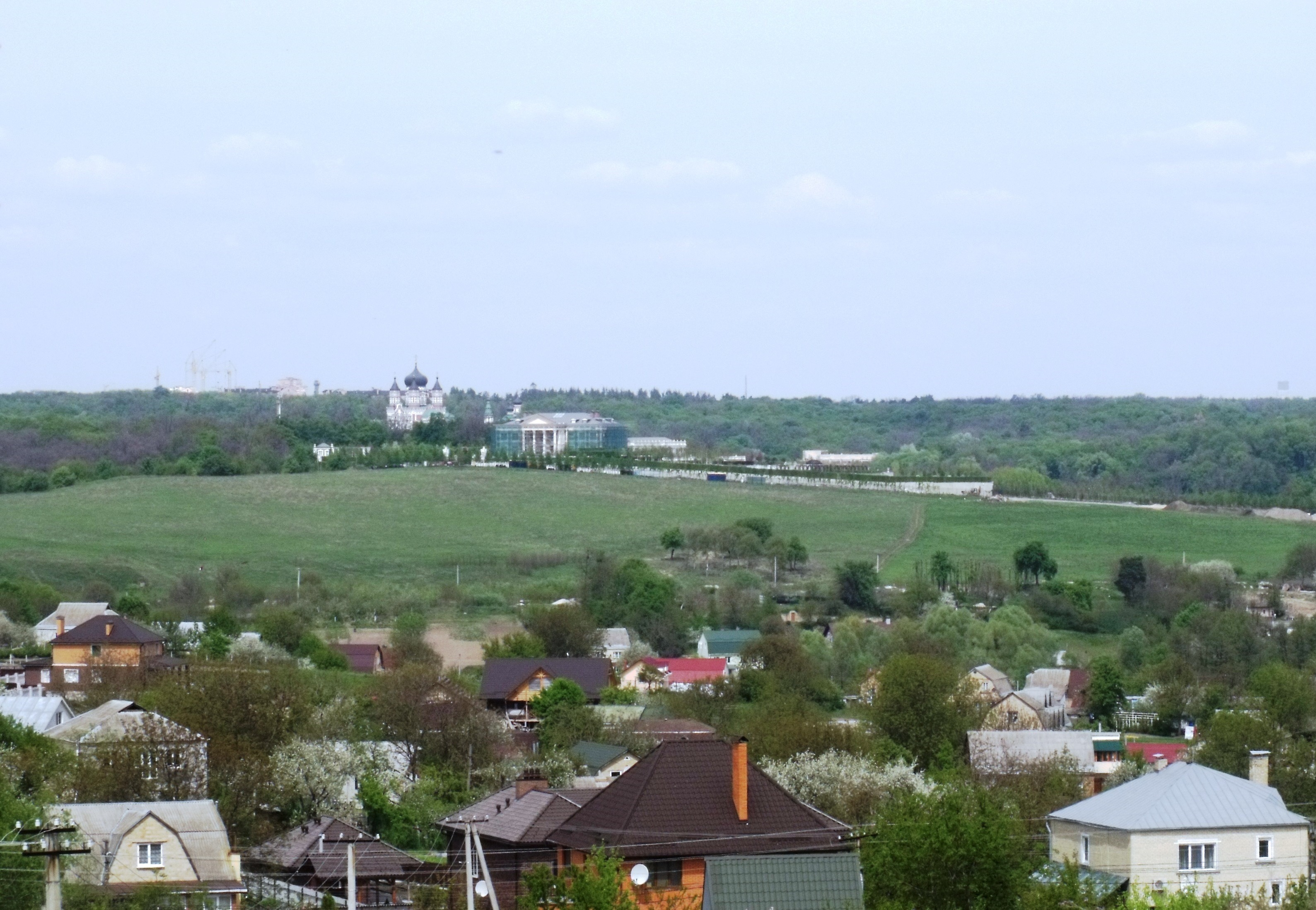 Вид з Хотова на Хотівське городище скіфських часів (VI - IV ст. до н.е.), фото 2016 р.